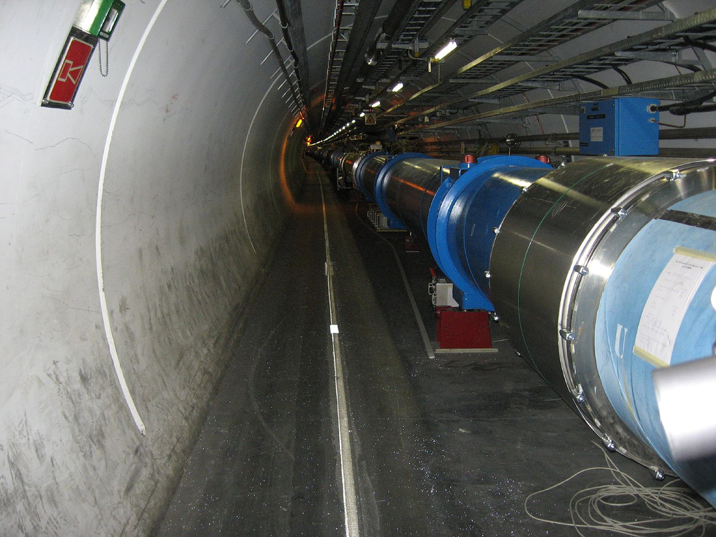 Large Hadron Collider dipole magnets.